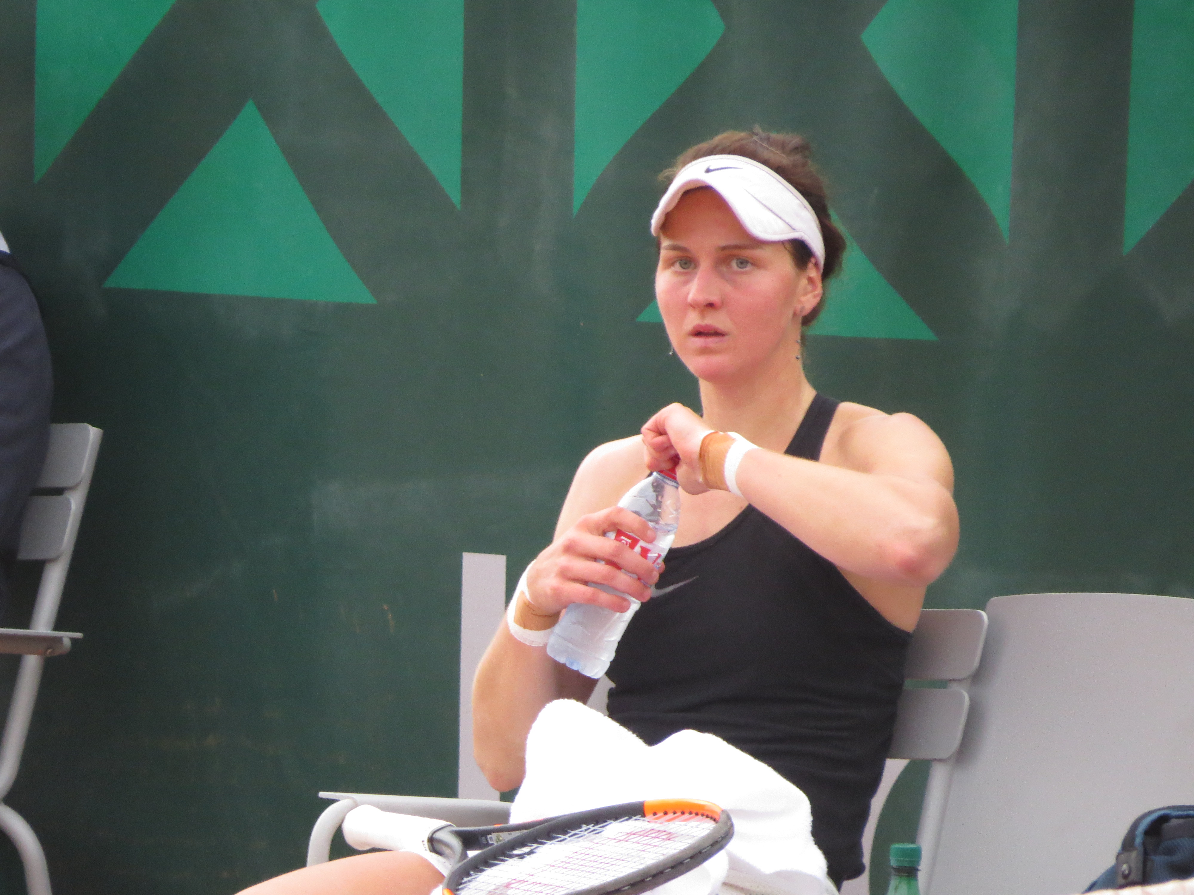 Liudmila Samsonova lors de son premier tour des qualifications.